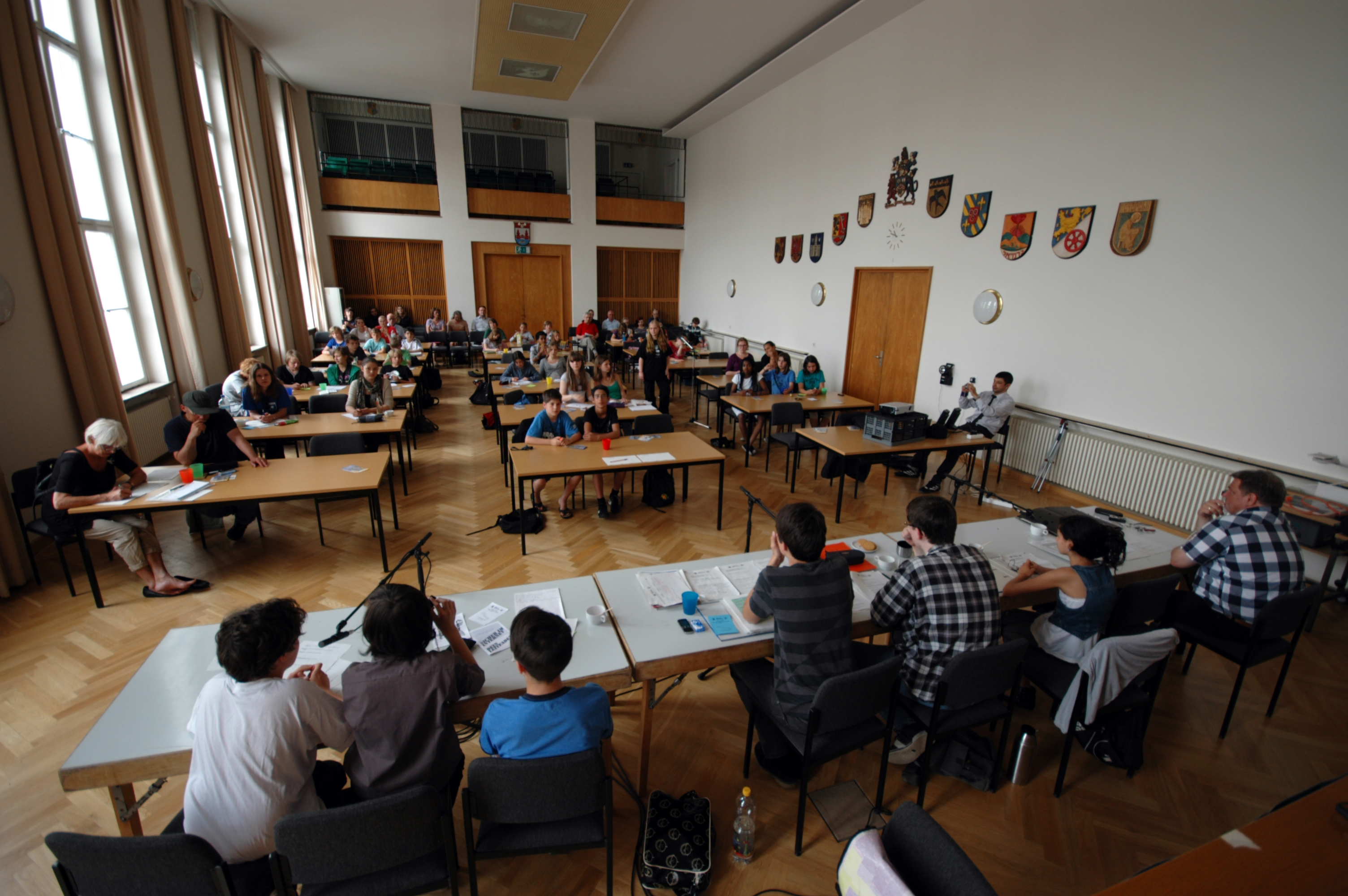 Kinder- und Jugendparlament Berlin Charlottenburg-Wilmersdorf öffentliche Sitzung Vorstellung der Funktionsweise der Wikipedia & des Wiki2go-Sticks